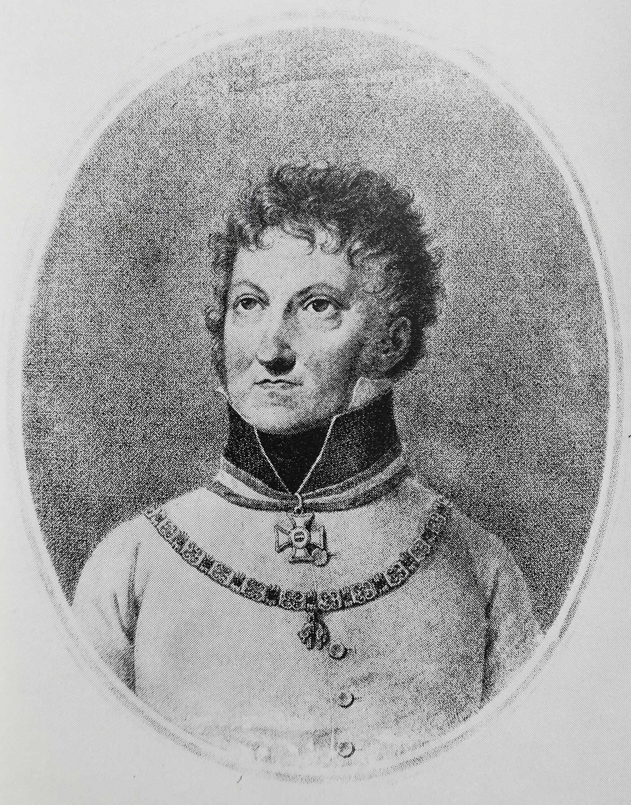 Franz Seraph von Rosenberg-Orsini (1761-1832), général autrichien. Après avoir guerroyé sur le front ottoman, il participe aux guerres de la Révolution française et joue un rôle important lors de la campagne de 1809 contre Napoléon, notamment aux batailles d'Eckmühl, d'Essling et de Wagram.